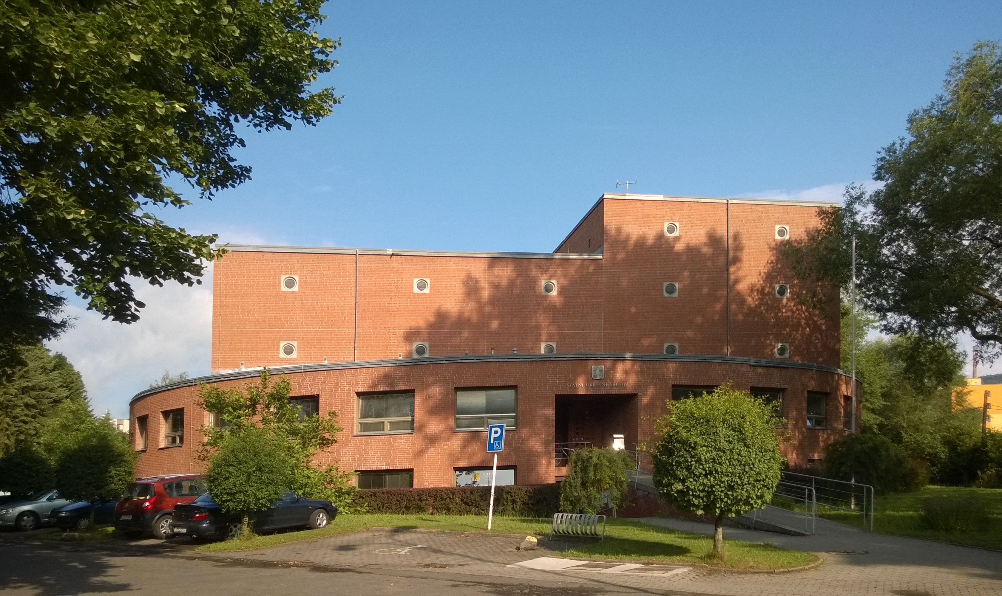 Hlavní průčelí budovy Státního okresního archivu Semily